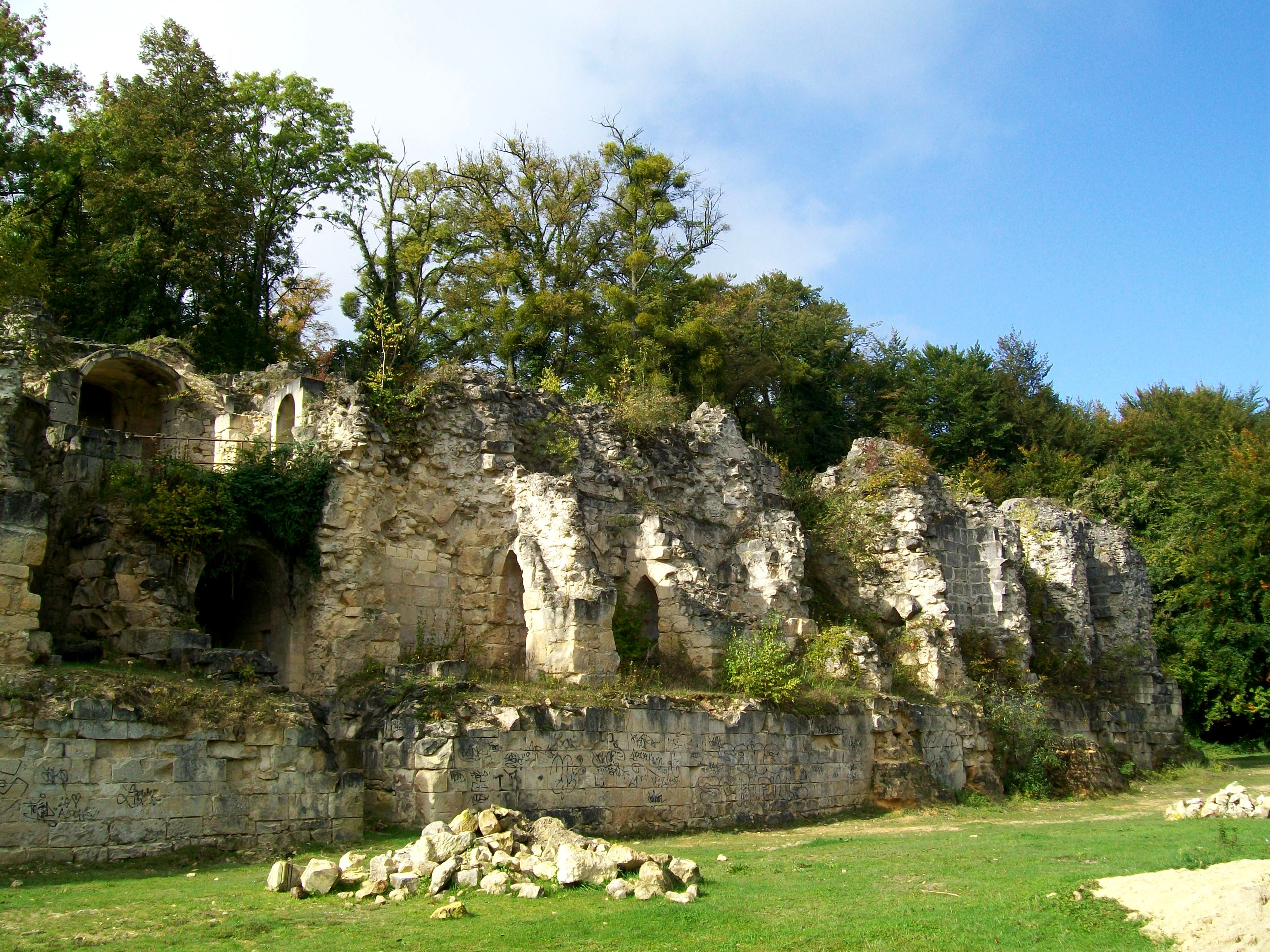 Vue sur ce qui fut la façade du château, donnant sur le village.